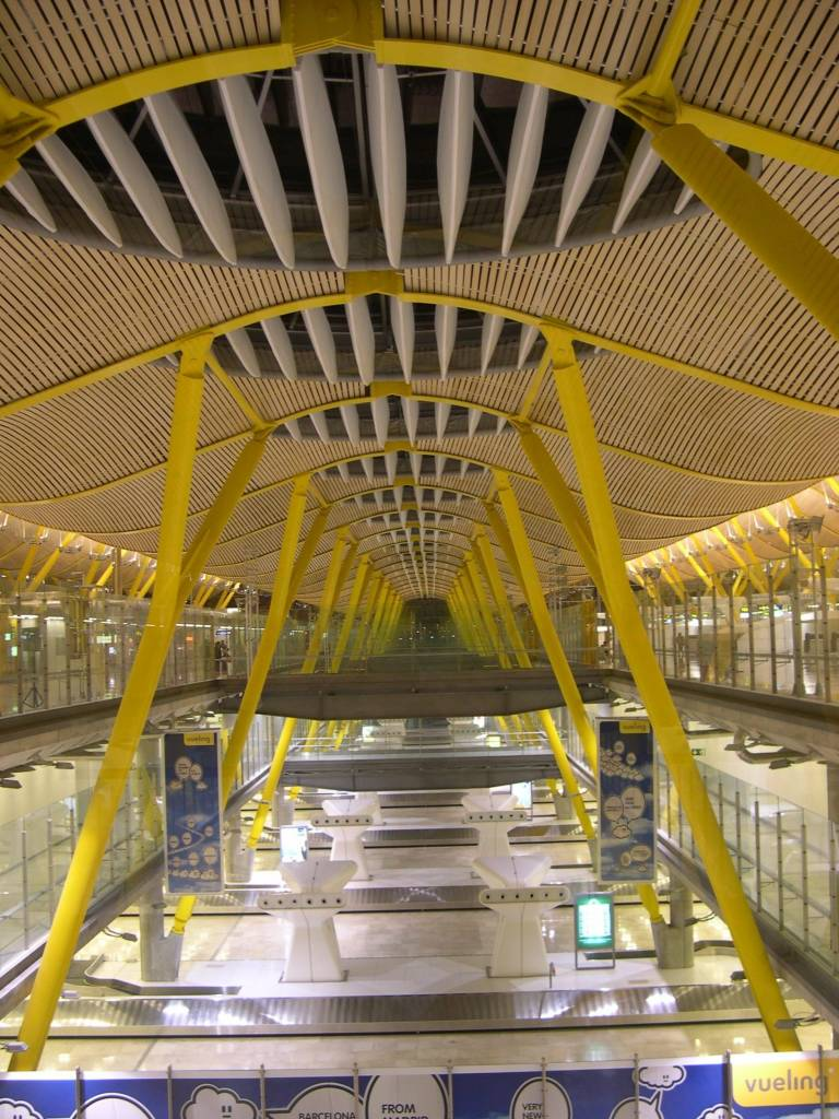 Baggage Belts at Terminal 4 in Madrid Barajas Airport.